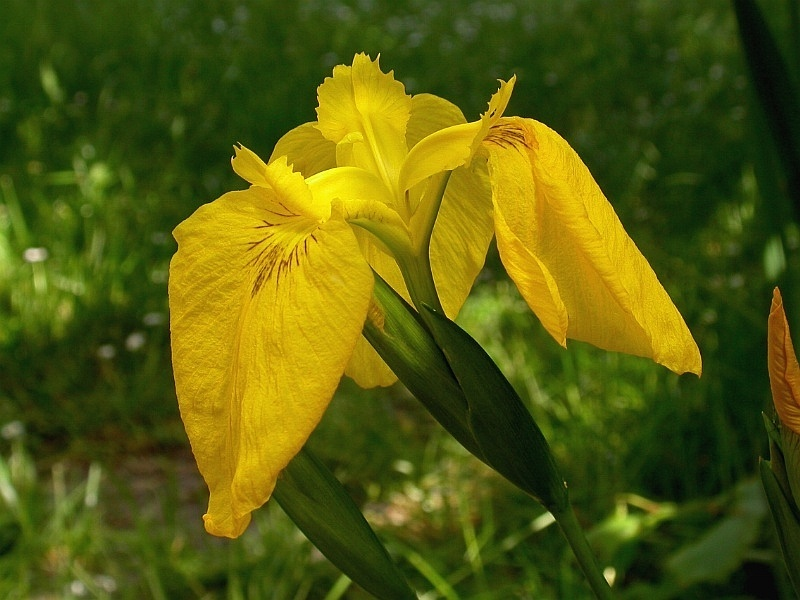 Iris pseudacorus, Gradignan, Gironde, France, 26 mai 2005